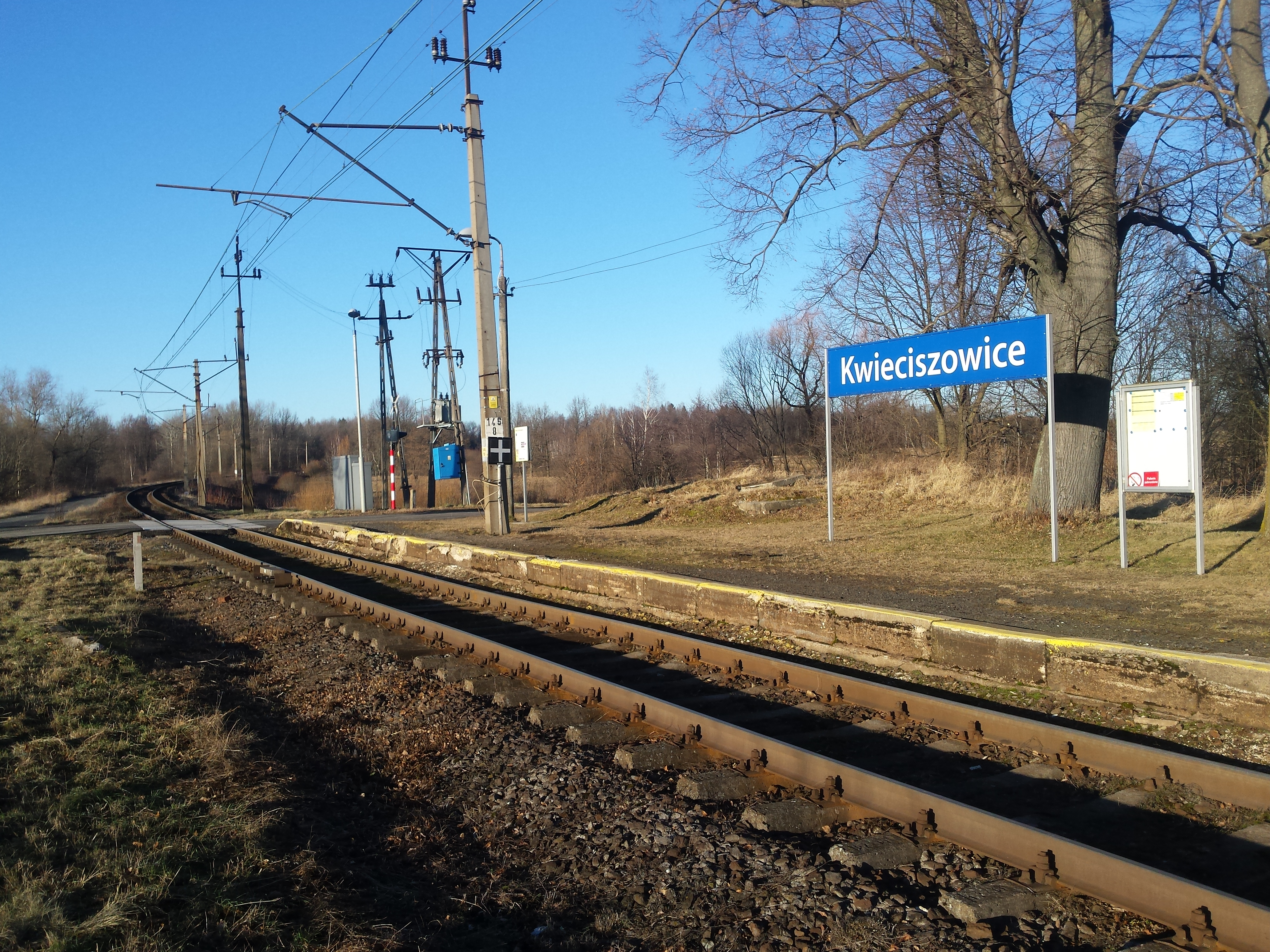 Po prawej tablica z nazwą przystanku i tablica informacyjna (rozkład jazdy), po lewej w tle widoczny przejazd kolejowy. Charakterystyczne obniżenie terenu widoczne w lewym dolnym rogu to pozostałość po drugim peronie, który istniał w okresie gdy linia była dwutorowa (do 1945 r.). Po lewej stronie niebieskiej tablicy widać w tle nienaturalne wzniesienie terenu z kawałkami betonowych płyt - to pozostałości po dawnej dróżniczówce zburzonej w 2008r.